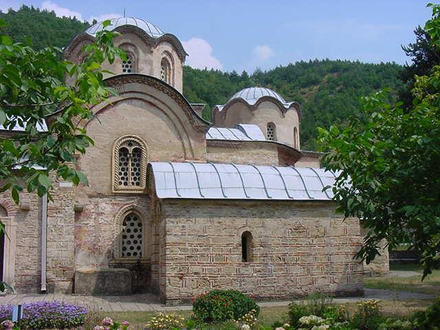 Patriarchat of peja, église de la Vierge Hodigitria